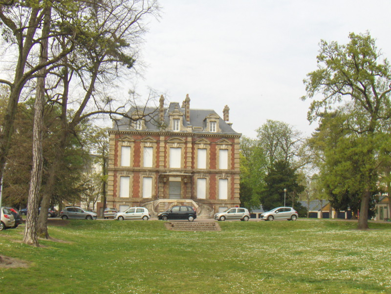 bibliothèque municipale et en logements sociaux